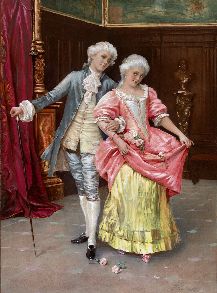 Junges Rokokopaar in prunkvollem Interieur. Gouache. 42 x 30,5 cm.